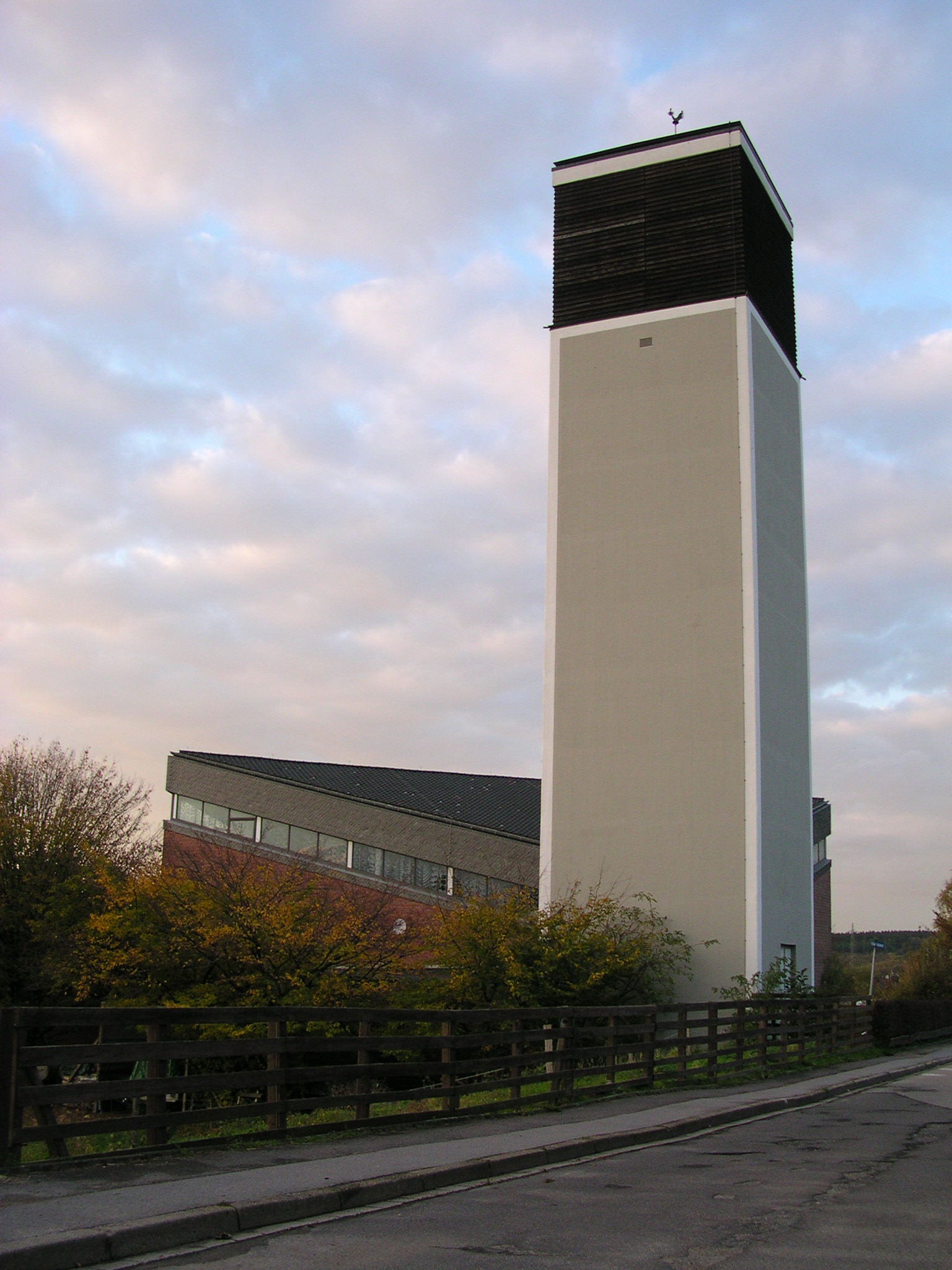 Stolberg Donnerberg, rk. Franziskuskirche